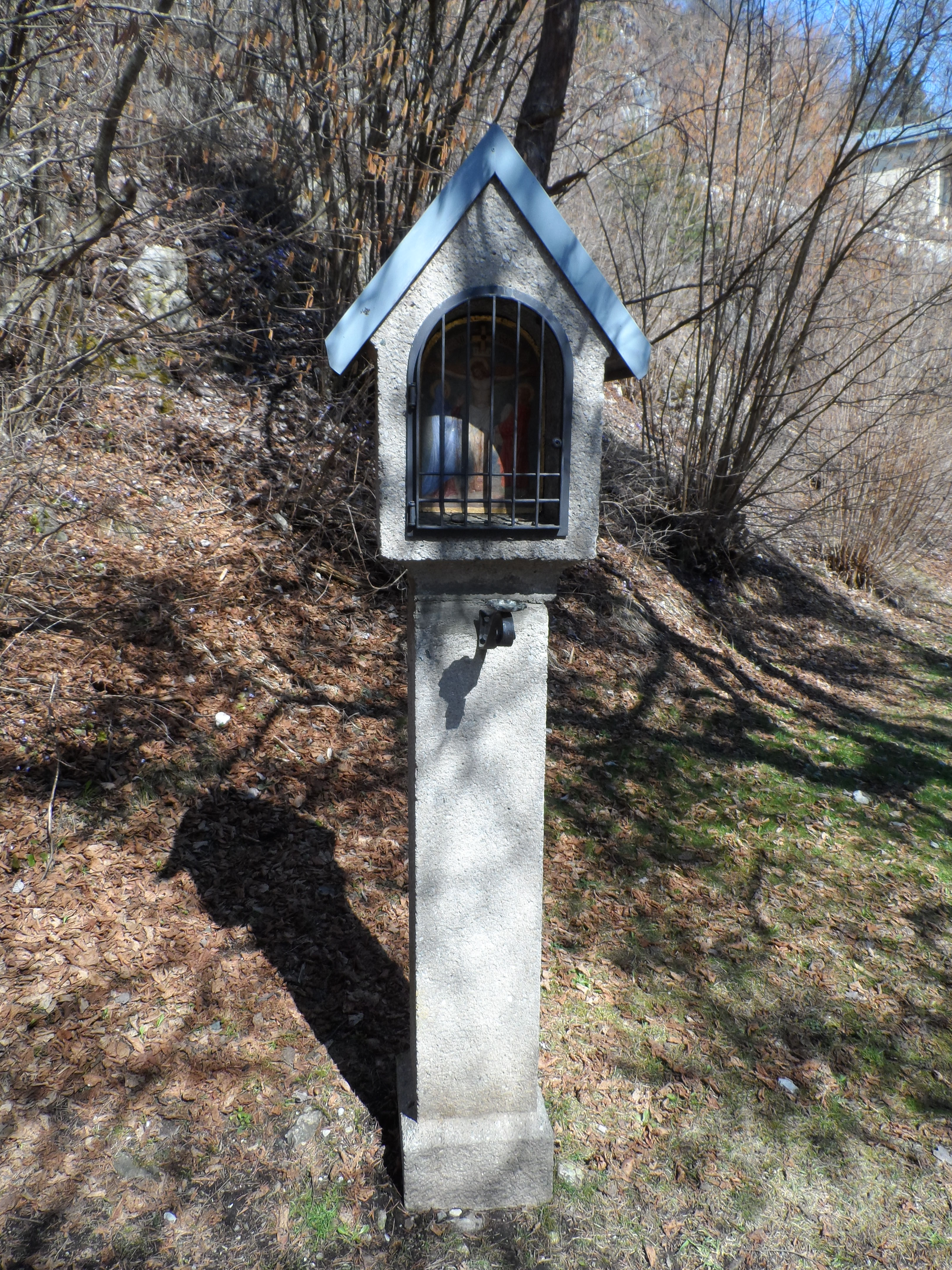 Kreuzweg von Mötz zur Wallfahrtskirche Locherboden, 12. Station - Locherboden, Mötz